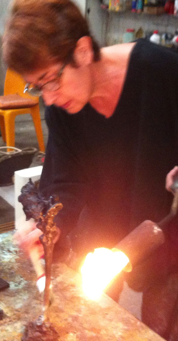 Le sculpteur Claude Cehes dans son atelier de Paris en 2015